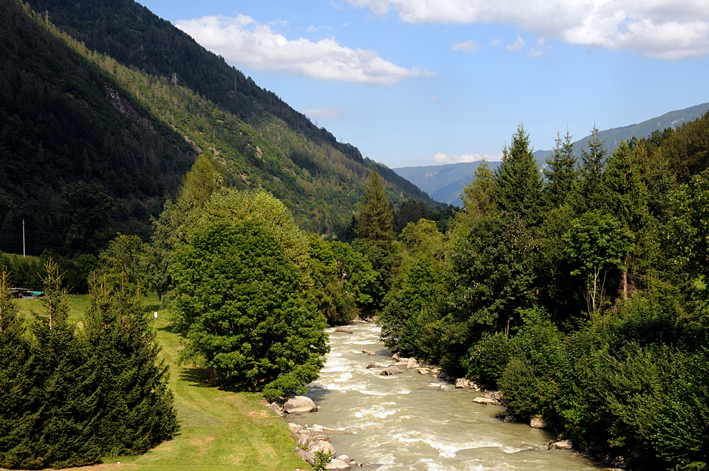 Fiume Noce - Val d Sole (TN) - foto scattata dal ponte a est del paese di Mezzana